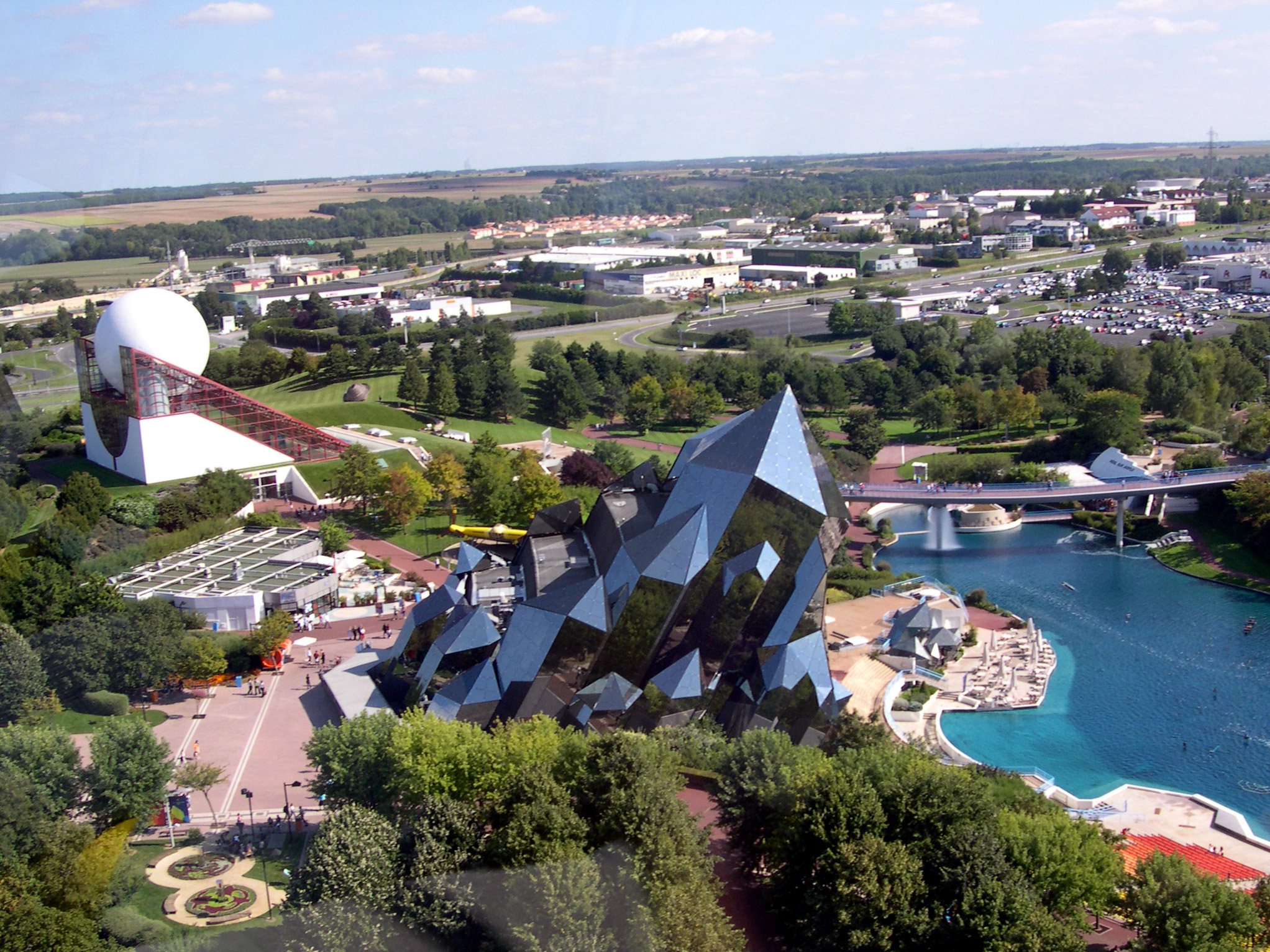 Photo prise de la Gyrotour au Futuroscope en Août 2006. On y voit notamment le Pavillon du Futuroscope et le Kinémax.